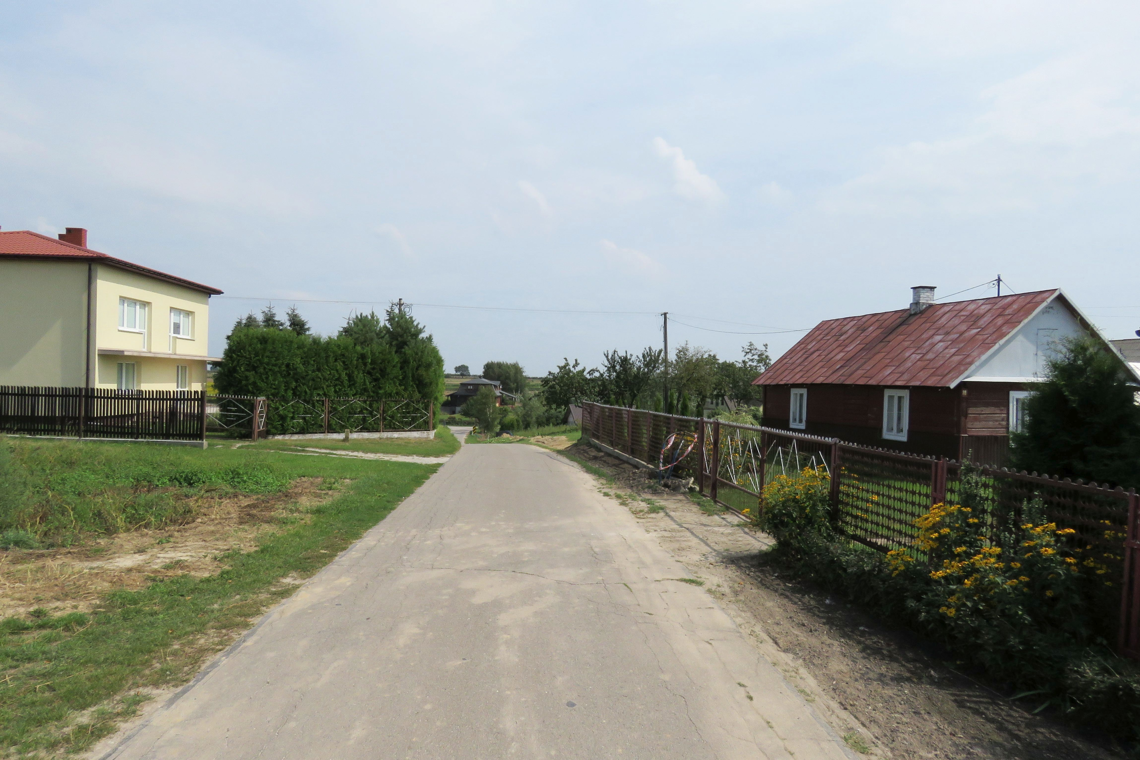 PŁOUSZOWICE